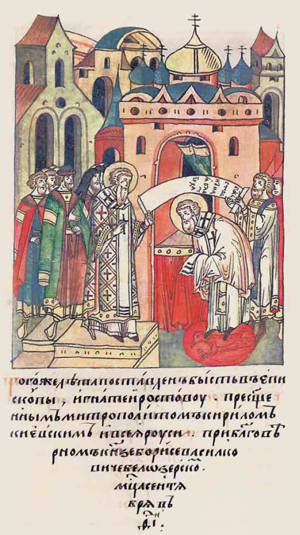 Поставление Игнатия епископом Ростовским, Лицевой летописный свод (том 6 стр. 278), надпись под изображением: Того же лета (6770) поставленъ бысть въ епископы Игнатей Ростову преосвященнымх митрополитомъ Кириломъ Киевскимъ и всея Руси, при благоверномъ князе Борисе Василковиче Белозерскомъ, месяца сентября, в 19 день